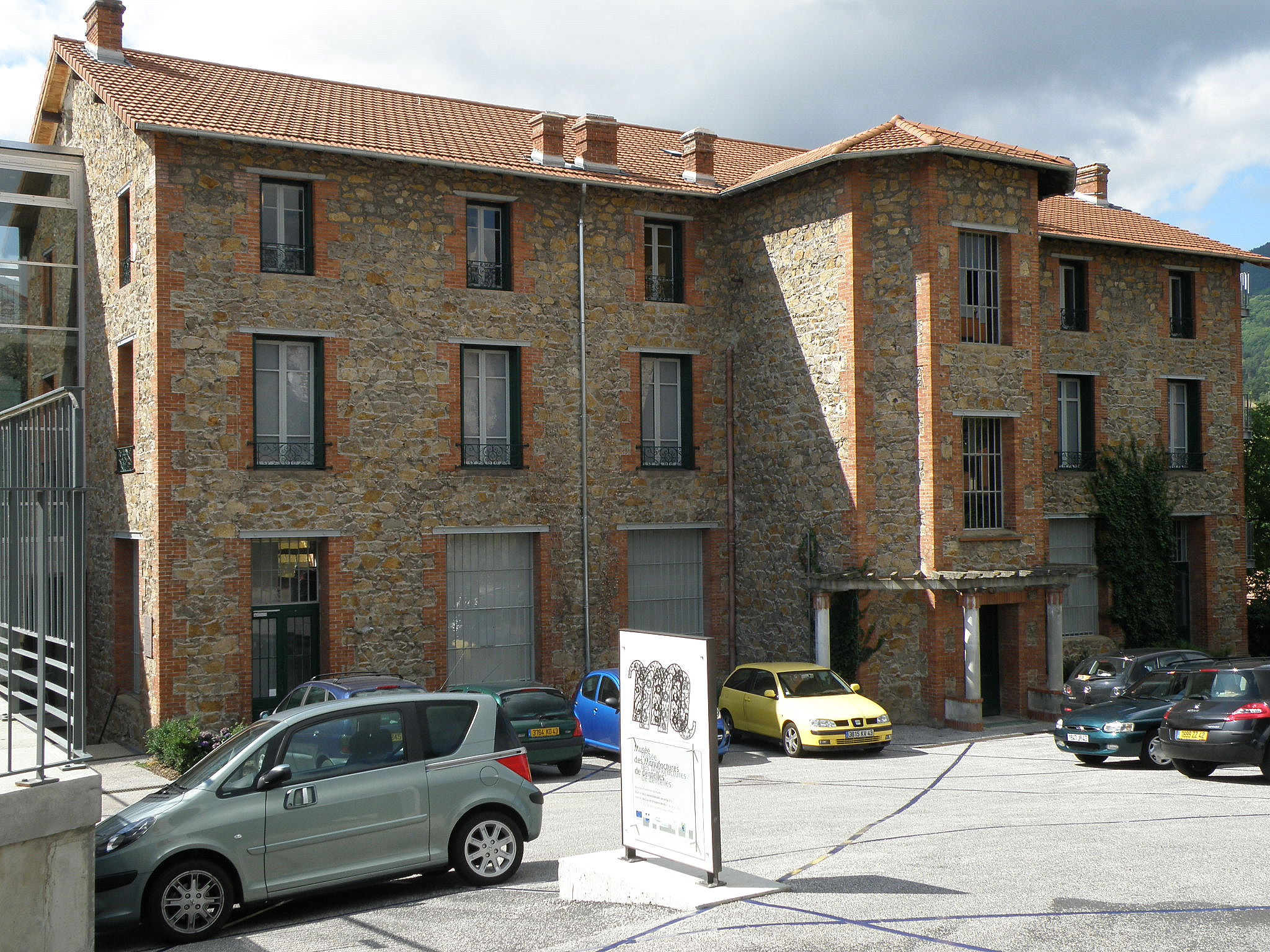 Retournac, dép. de la Haute-Loire, France (Auvergne). Musée des Manufactures de dentelles.